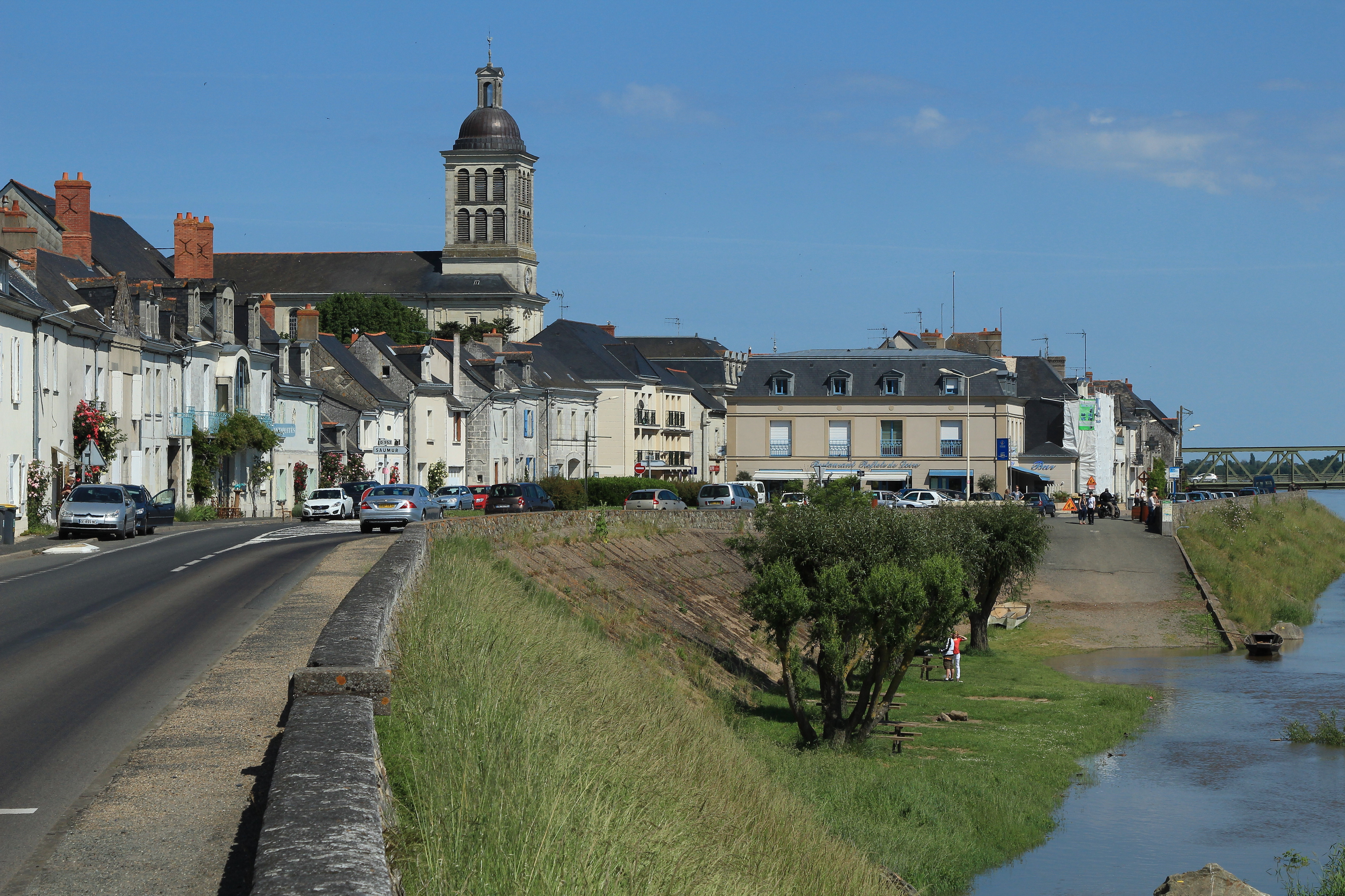 Levée du Roi René à Saint-Mathurin-sur-Loire